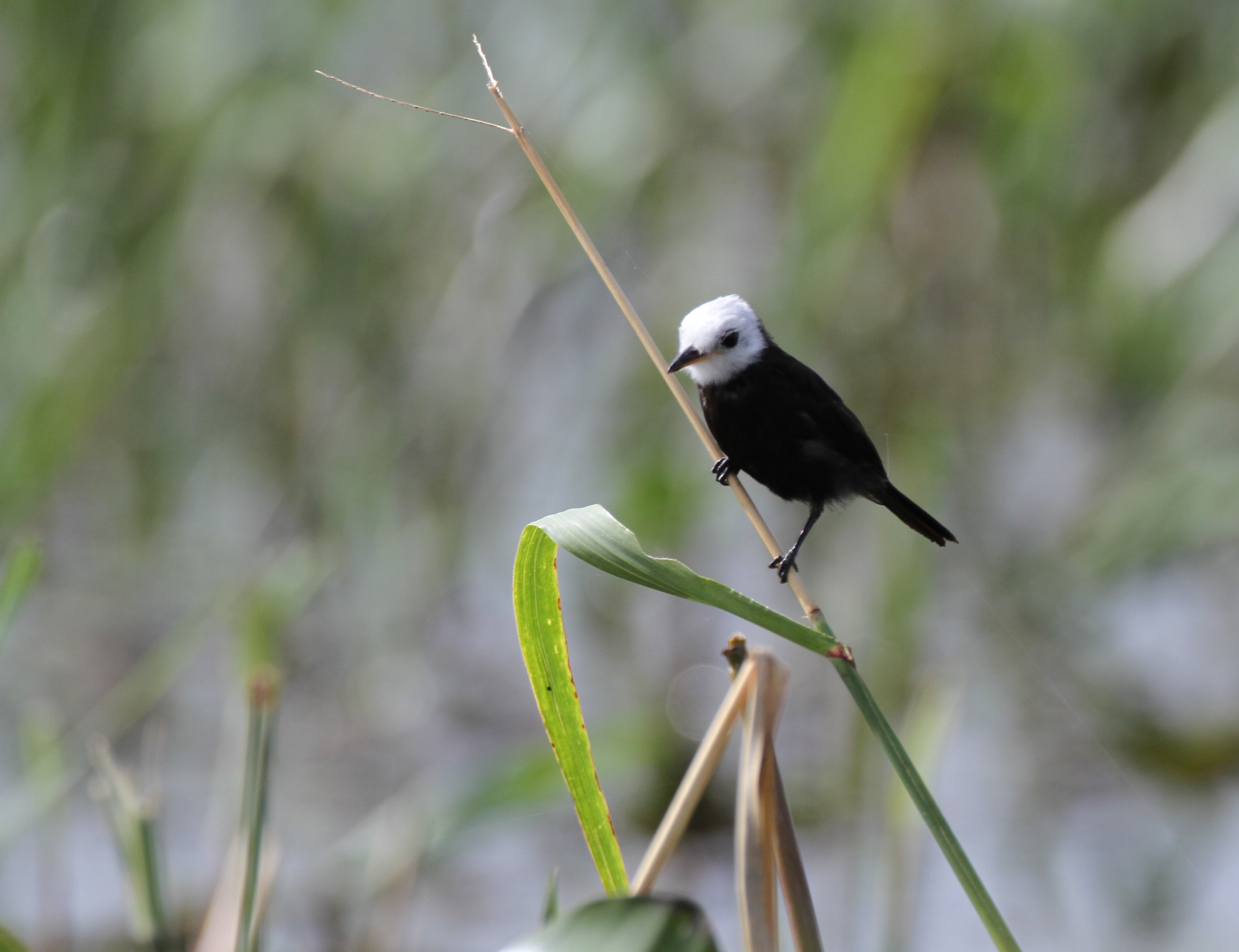 Moucherolle à tête blanche dans les marais de Kaw, en Guyane